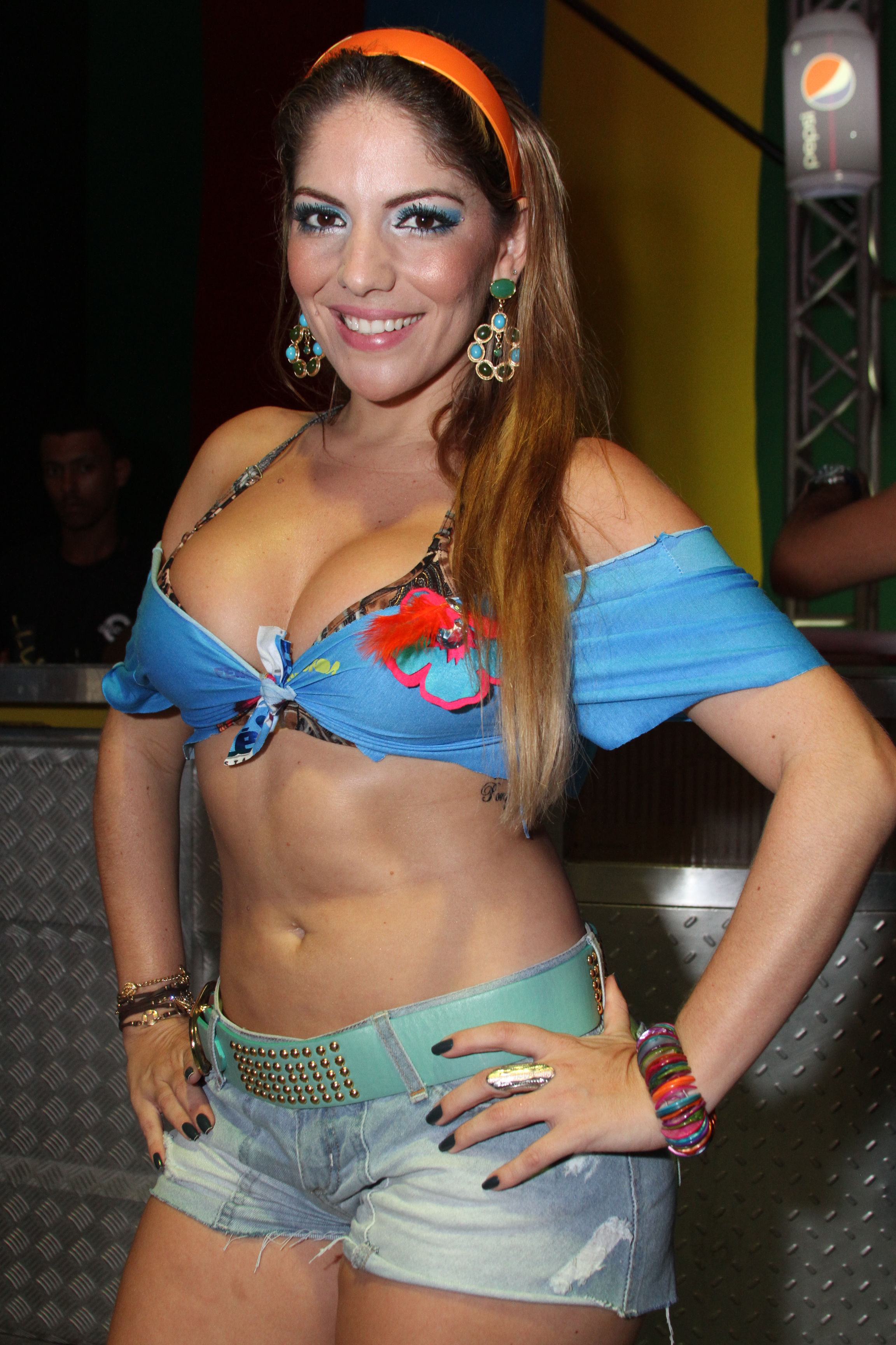 Anamara Barreira